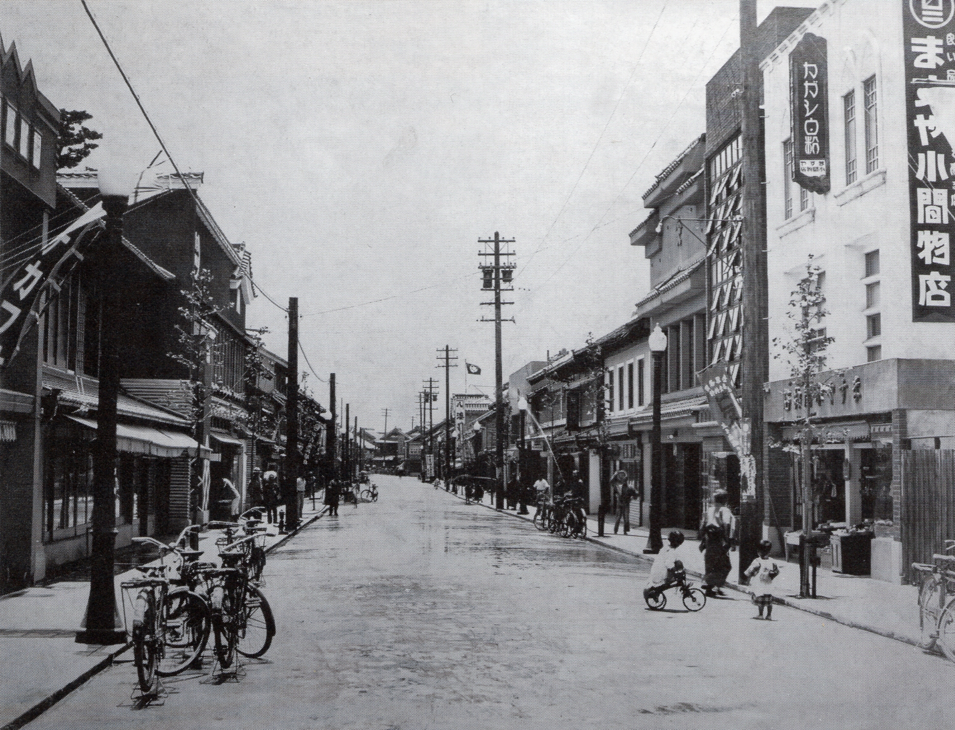 西尾市本町。1933年、都市計画の第一人者であった県の設計技師、石川英耀の指導を受け、道路拡幅工事が行われた。